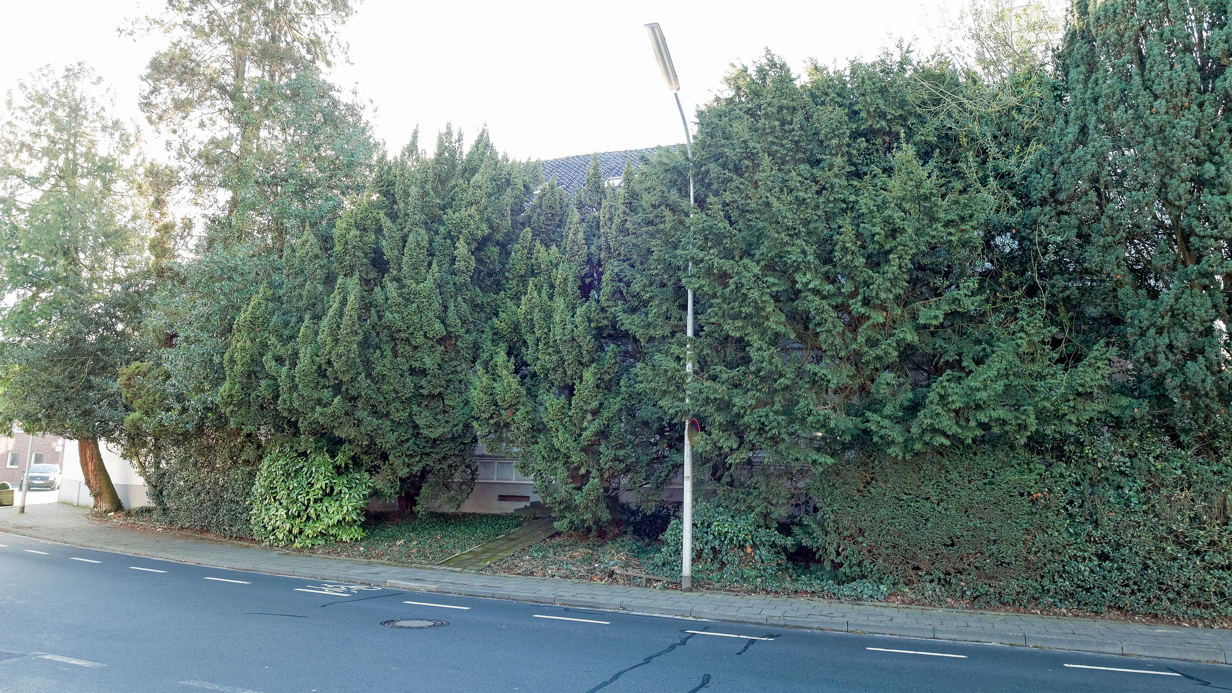 Korschenbroich Denkmal 001: Hauptstraße 101 - leider (2019_02-14) durch Baumbestand komplett verdeckt (Ansicht vom Haus gegenüber)